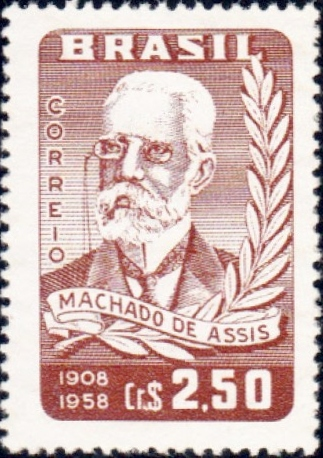 Selo postal brasileiro, emitido em 1958, lembrando os 50 anos do falecimento do escritor Machado de Assis.